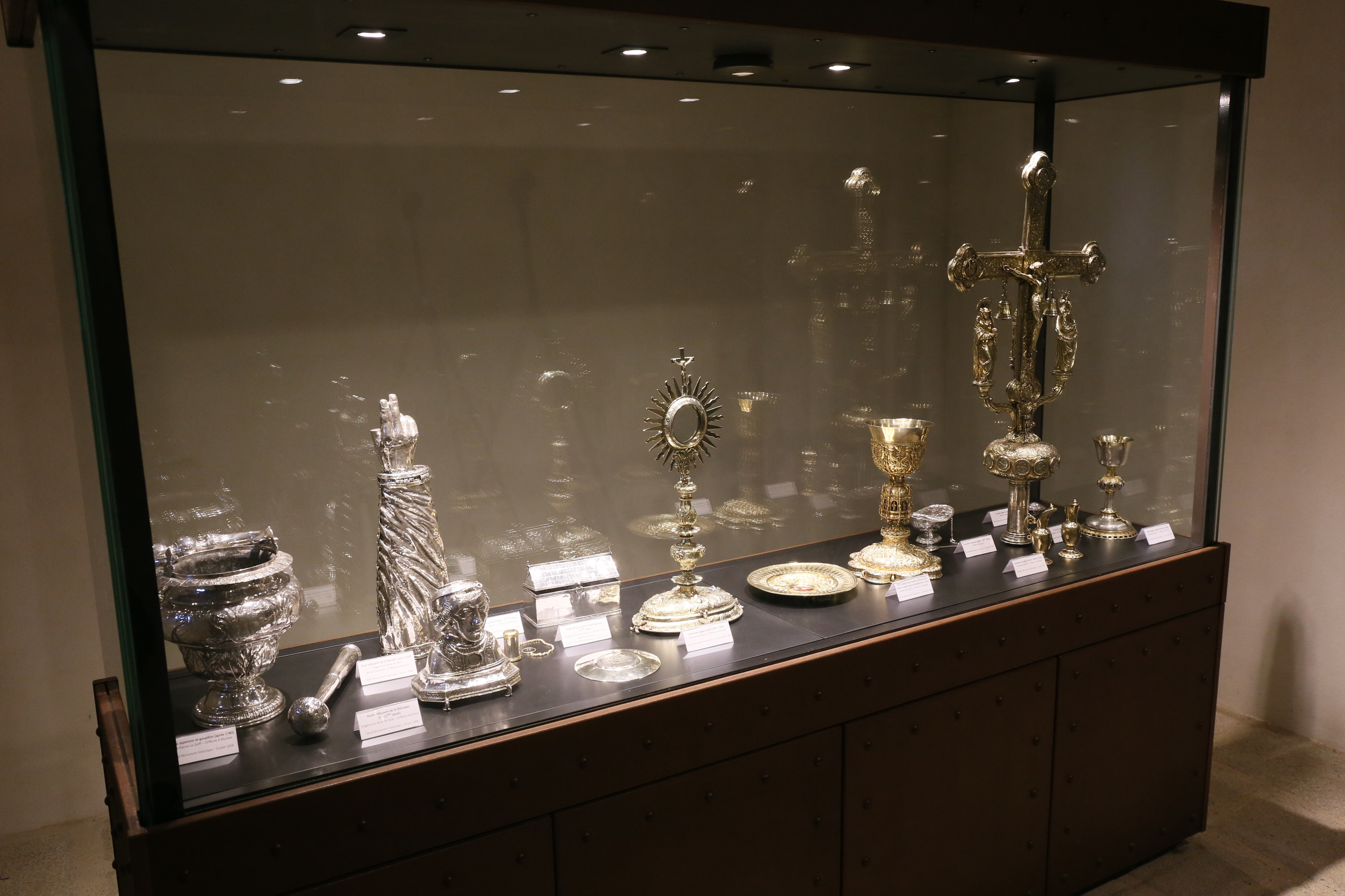 Trésor de Saint-Jean-du-Doigt en vitrine en l'église paroissiale.